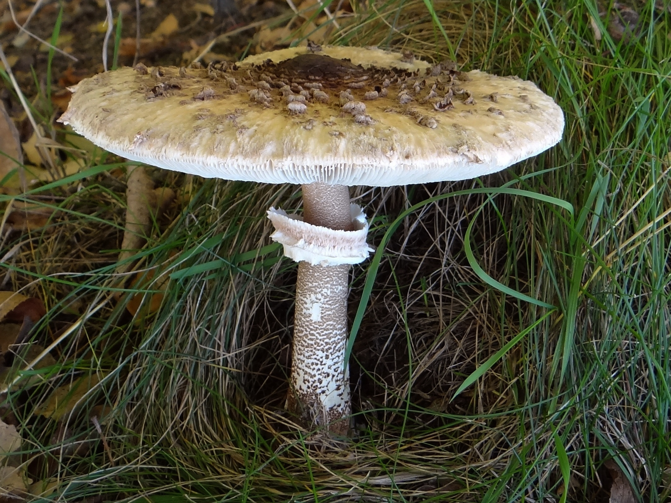 Macrolepiota procera